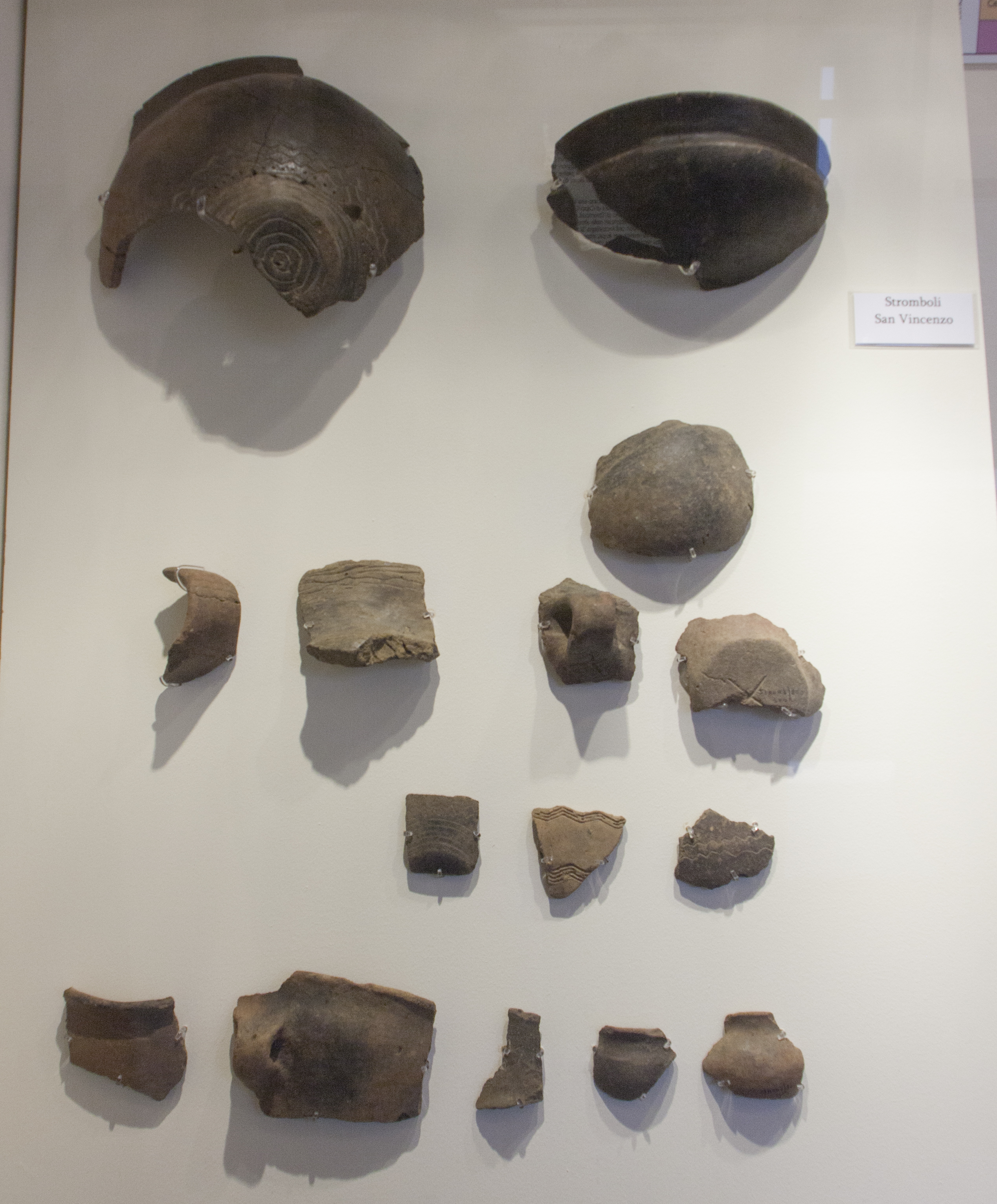 Età del bronzo antico e medio 1-2 cultura di Capo Graziano, fasi I e II 2300-1500 a.C.